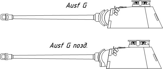 Пантера G Вид башни Пантеры Ausf G